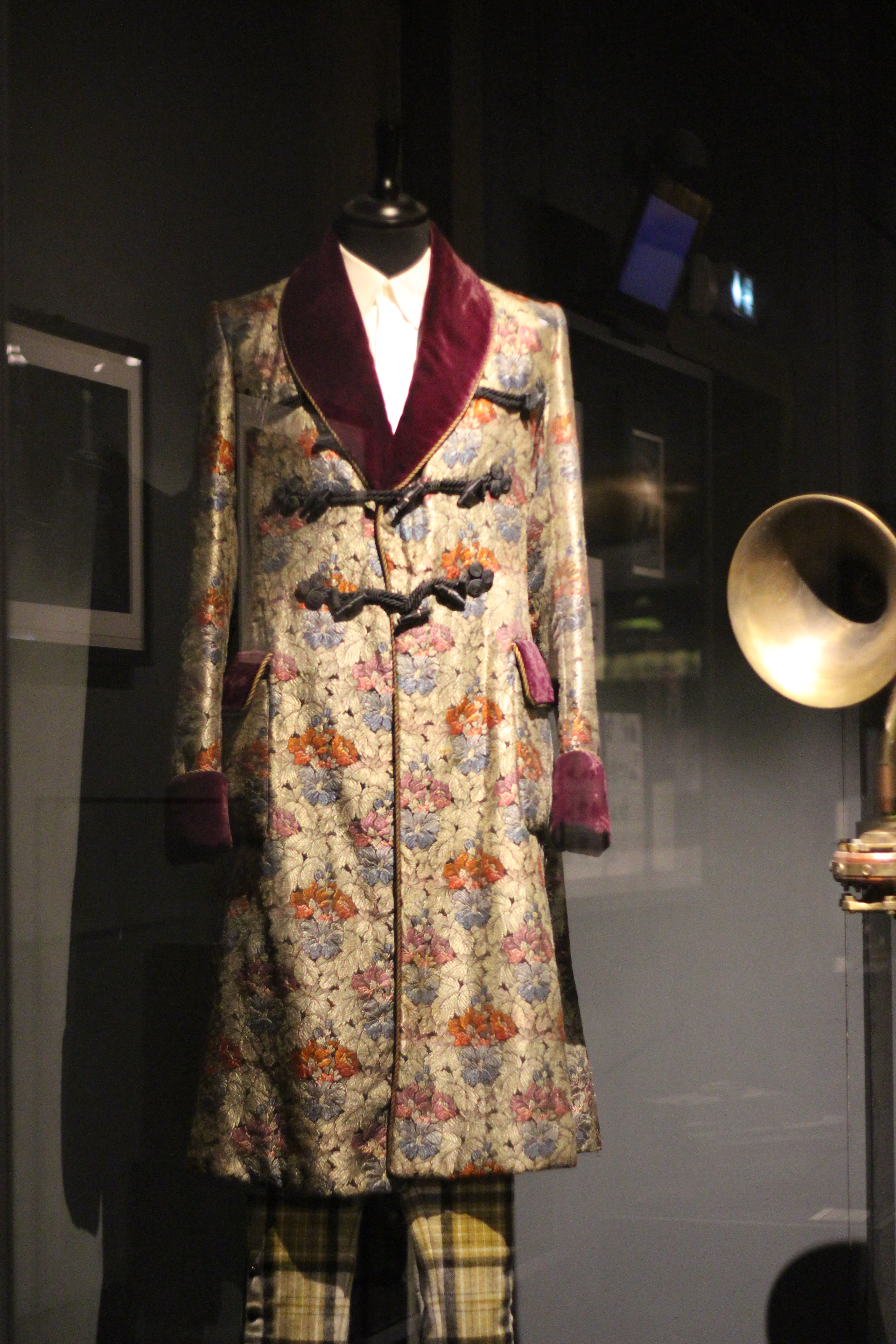 Costume de Krank (joué par Daniel Emilfork) dans le film La Cité des enfants perdus (costume créé par Jean-Paul Gaultier). Exposition "Caro/Jeunet" au musée Minature et Cinéma en 2018-2019.